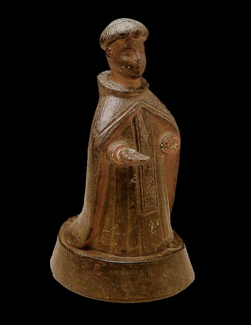 Santo dominicano ("Paulistinha") , barro cozido e policromado, século XIX; proveniente de Santa Isabel, SP. Altura: 18,7 cm - fundo editado (edited background). Acervo do Museu de Arte Sacra de São Paulo (São Paulo, Brasil)